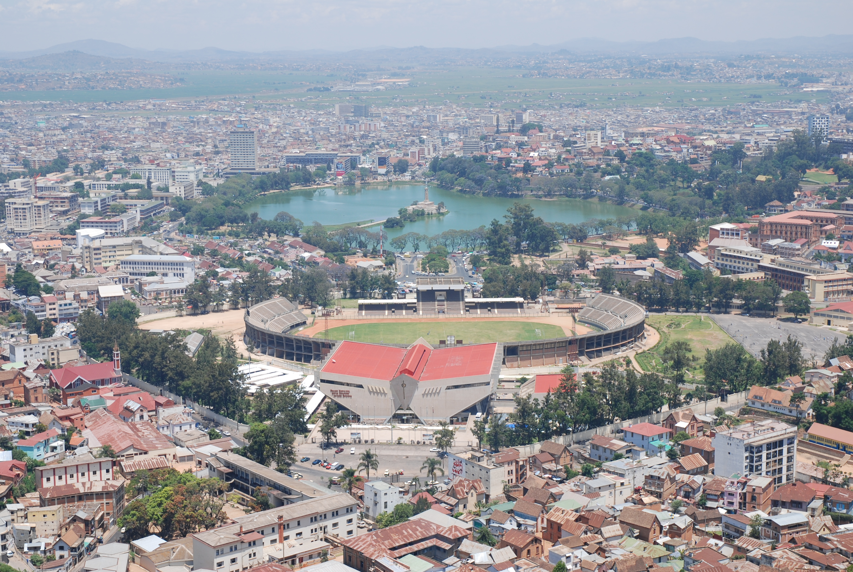 Stadion von Tana